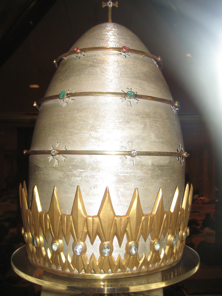 Tiara Pawła VI